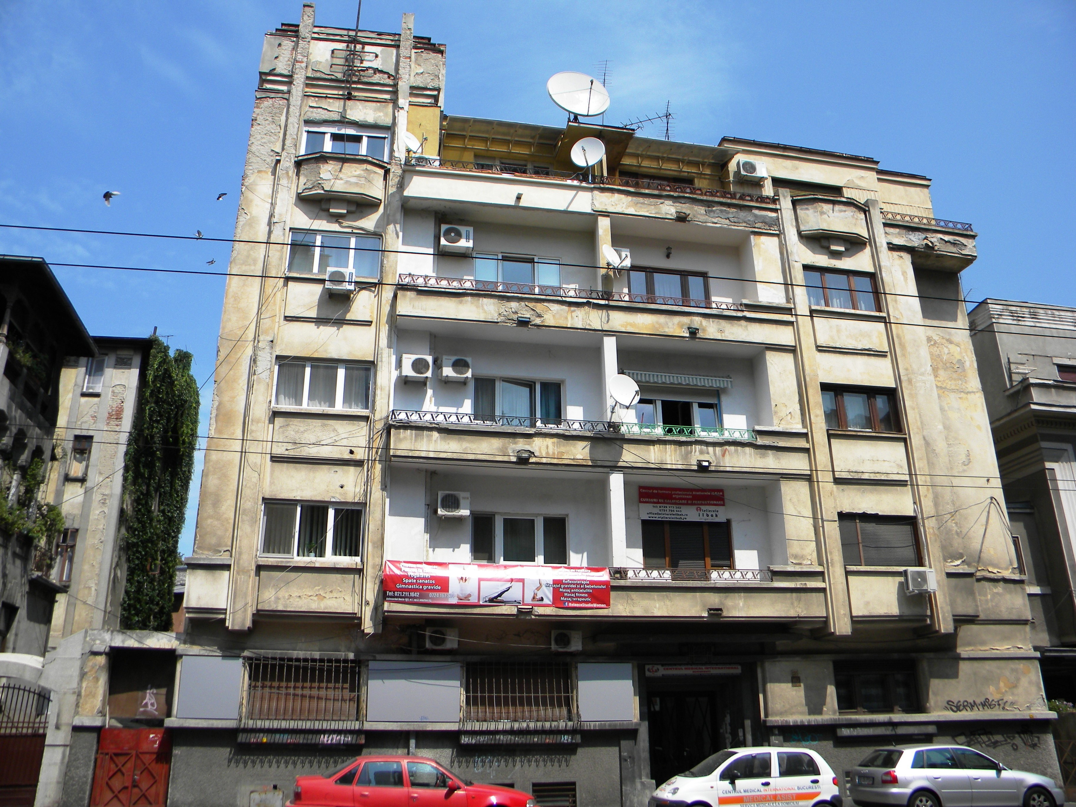 Imobil pe Bd. Dacia nr. 103, Bucuresti